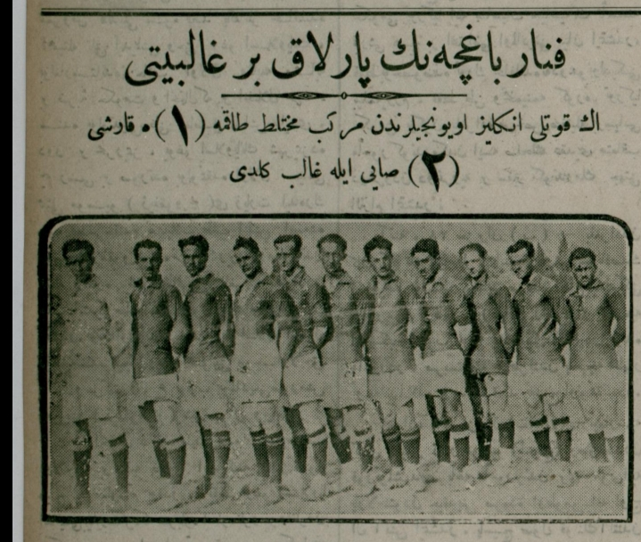 Kupürdeki yazı şu şekilde : "Fenerbahçe'nin parlak bir galibiyeti. En kuvvetli İngiliz oyuncularından mürekkep muhtelit takıma (1)e karşı (2) sayıyla galip geldi.